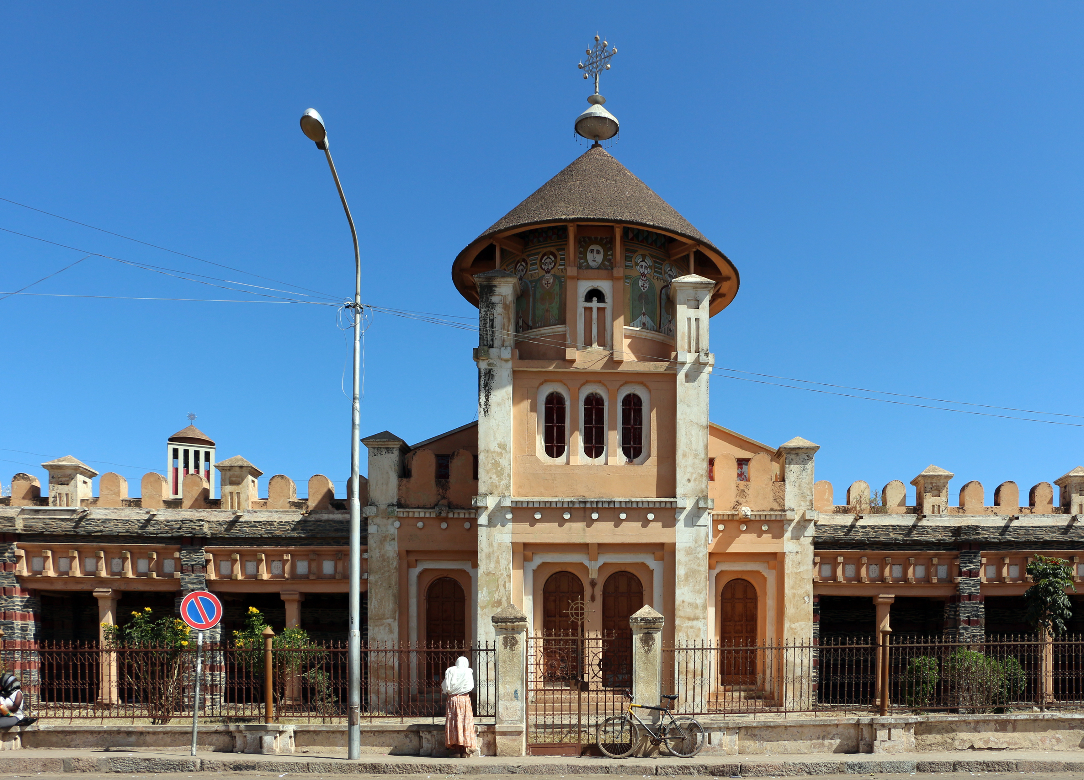 Asmara, cattedrale ortodossa 02.JPG